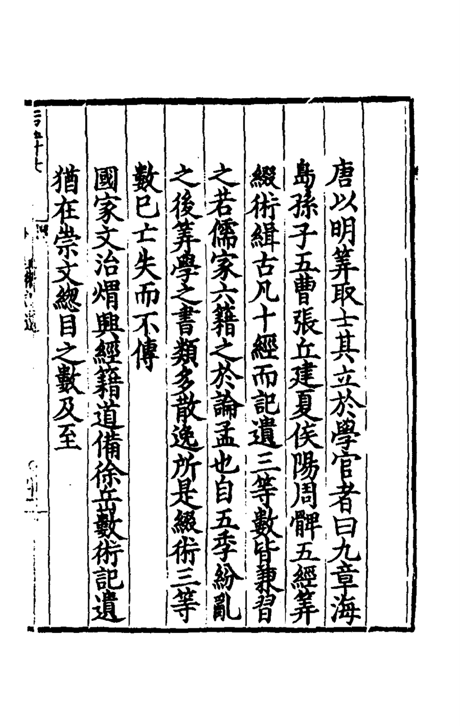 北周甄鸾撰数术记遗